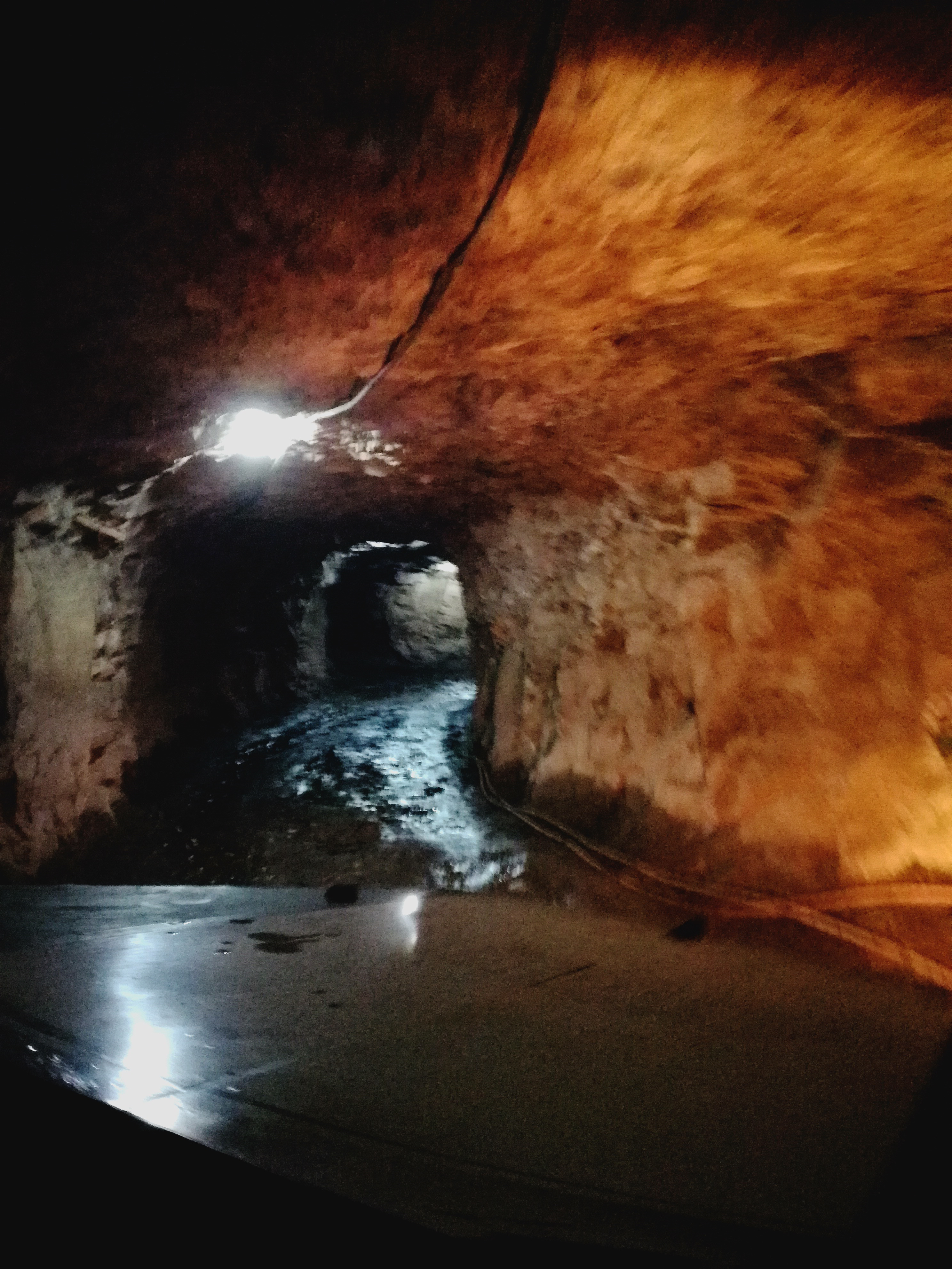 Mina de piedra amatista en el municipio de Ametista do Sul, Rio Grande do Sul, Brasil.